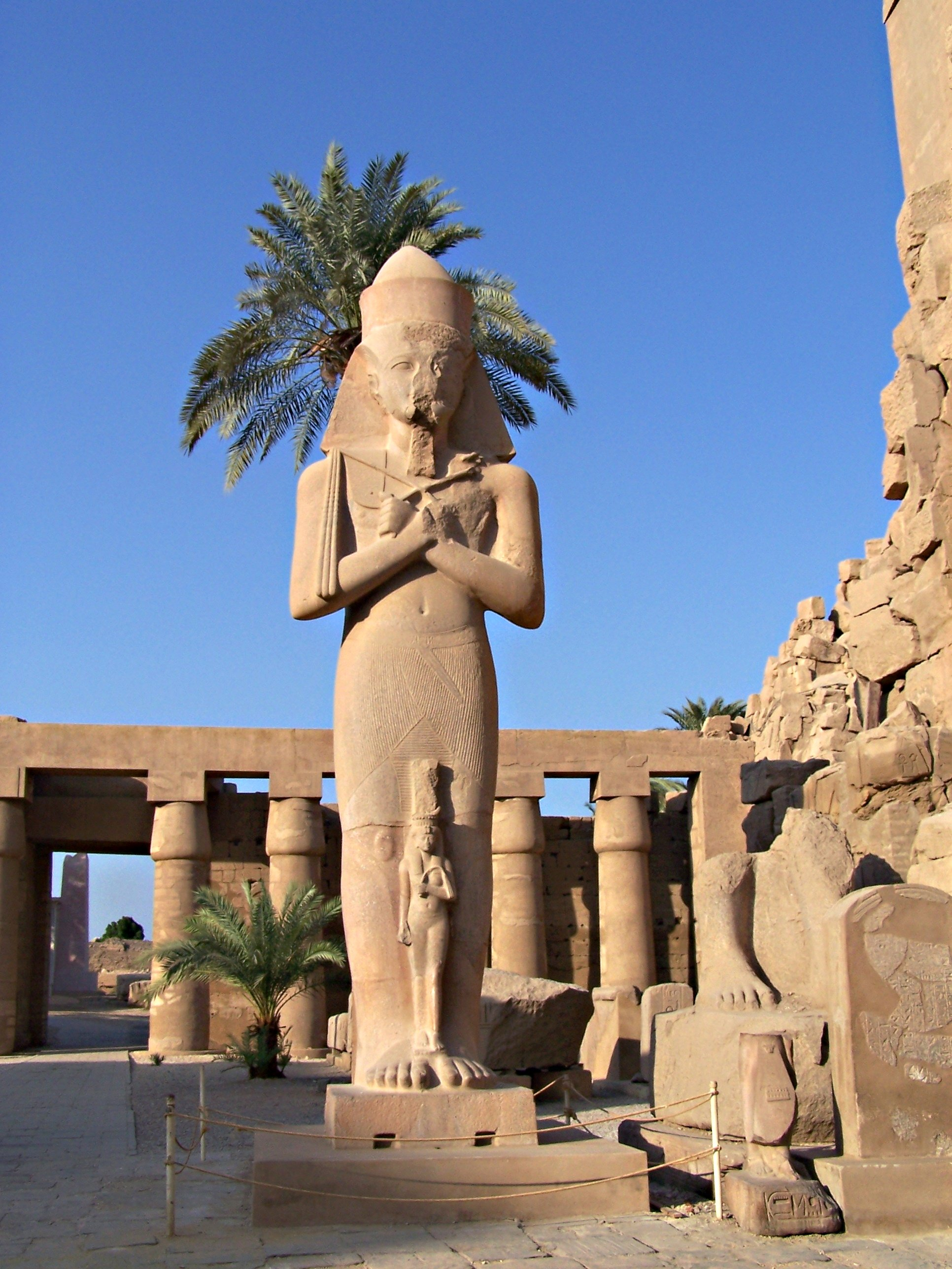 La statua di Pinudjem I nel tempio di Karnak